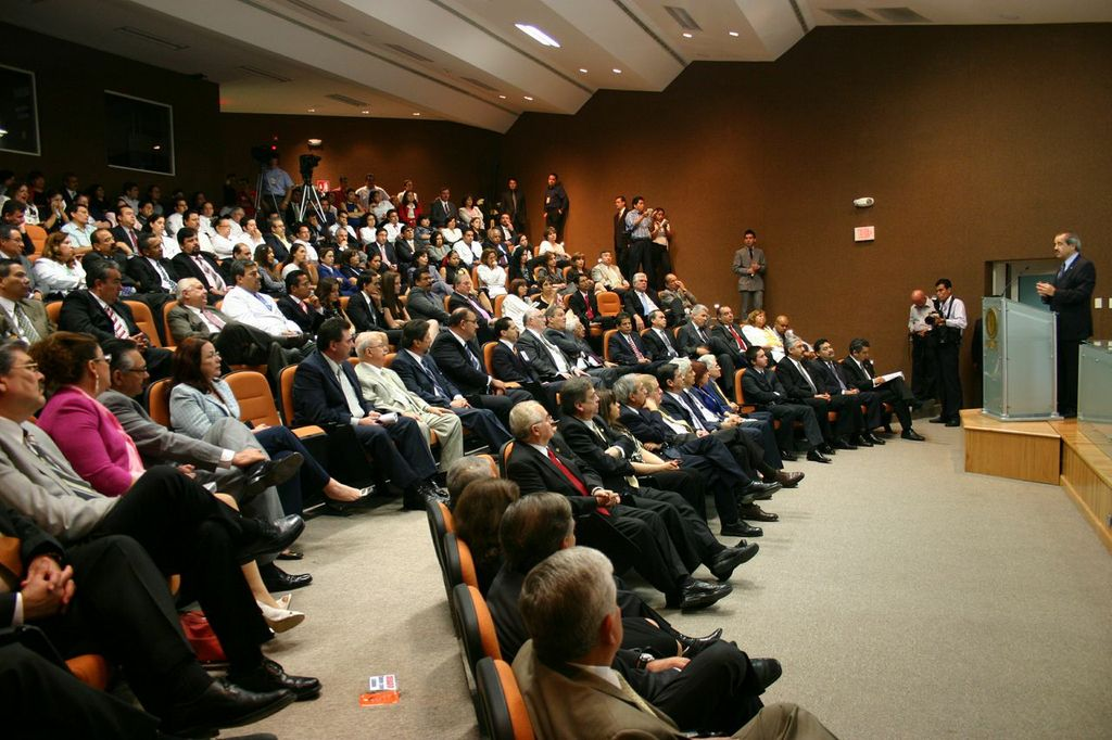 Auditorio del Centro de Investigación y Desarrollo en Ciencias de la Salud. El estado de Nuevo León